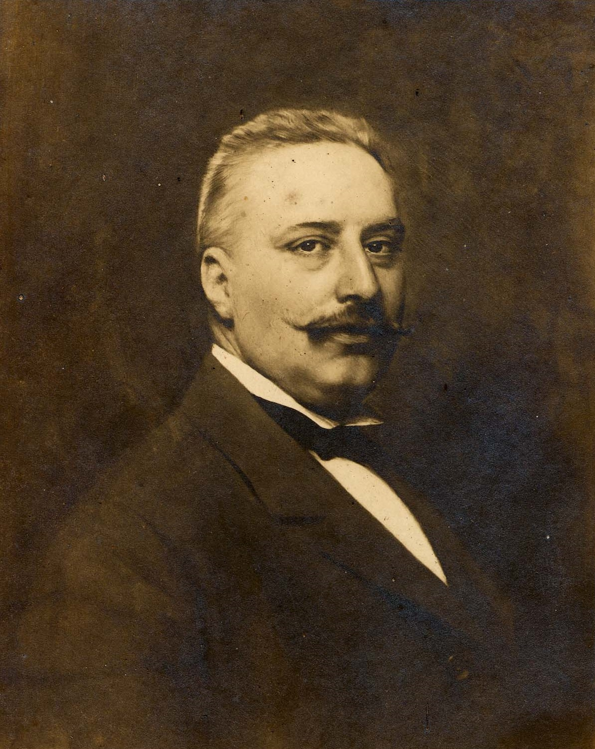 immagine dell'architetto Giovanni Sardi